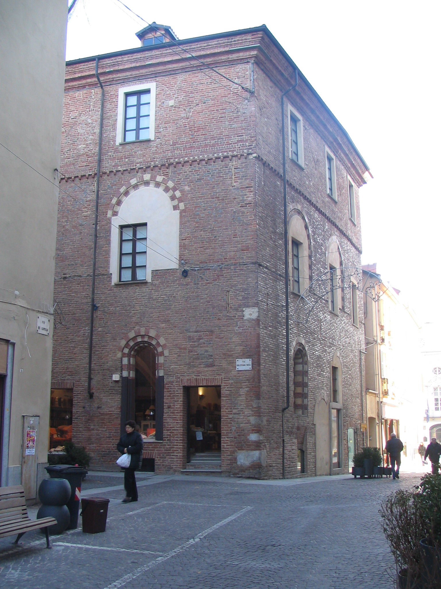 Palazzo del Podestà (Ruler's Palace) in Asti, Piedmont, Italy